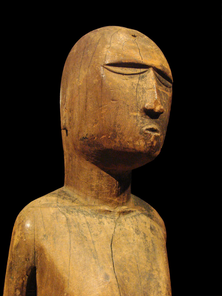 Effigie de divinité, Ro'go Ile de Mangareva, Archipel des Gambier, Océanie Bois Metropolitan Museum of art, NY Exposition Mangareva Musée du quai Branly